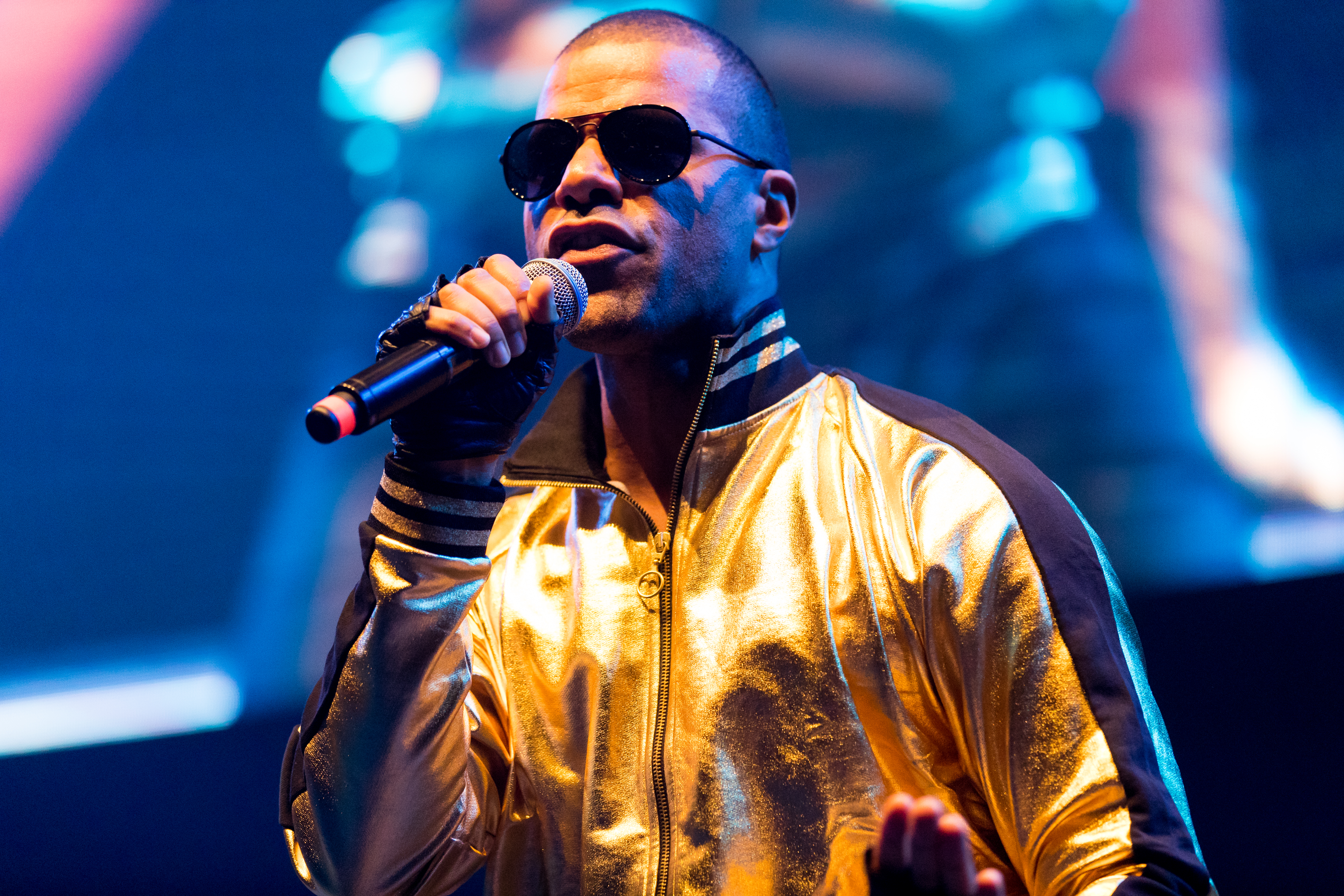 Pharao during Sunshine Live - Die 90er Live on Stage at Maimarkthalle & Maimarktclub, Mannheim, Baden-Württemberg, Germany on 2017-11-25, Photo: Sven Mandel